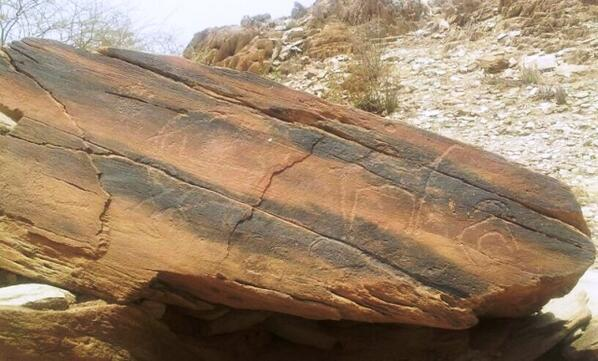 نقوش على احد الصخور ببارق